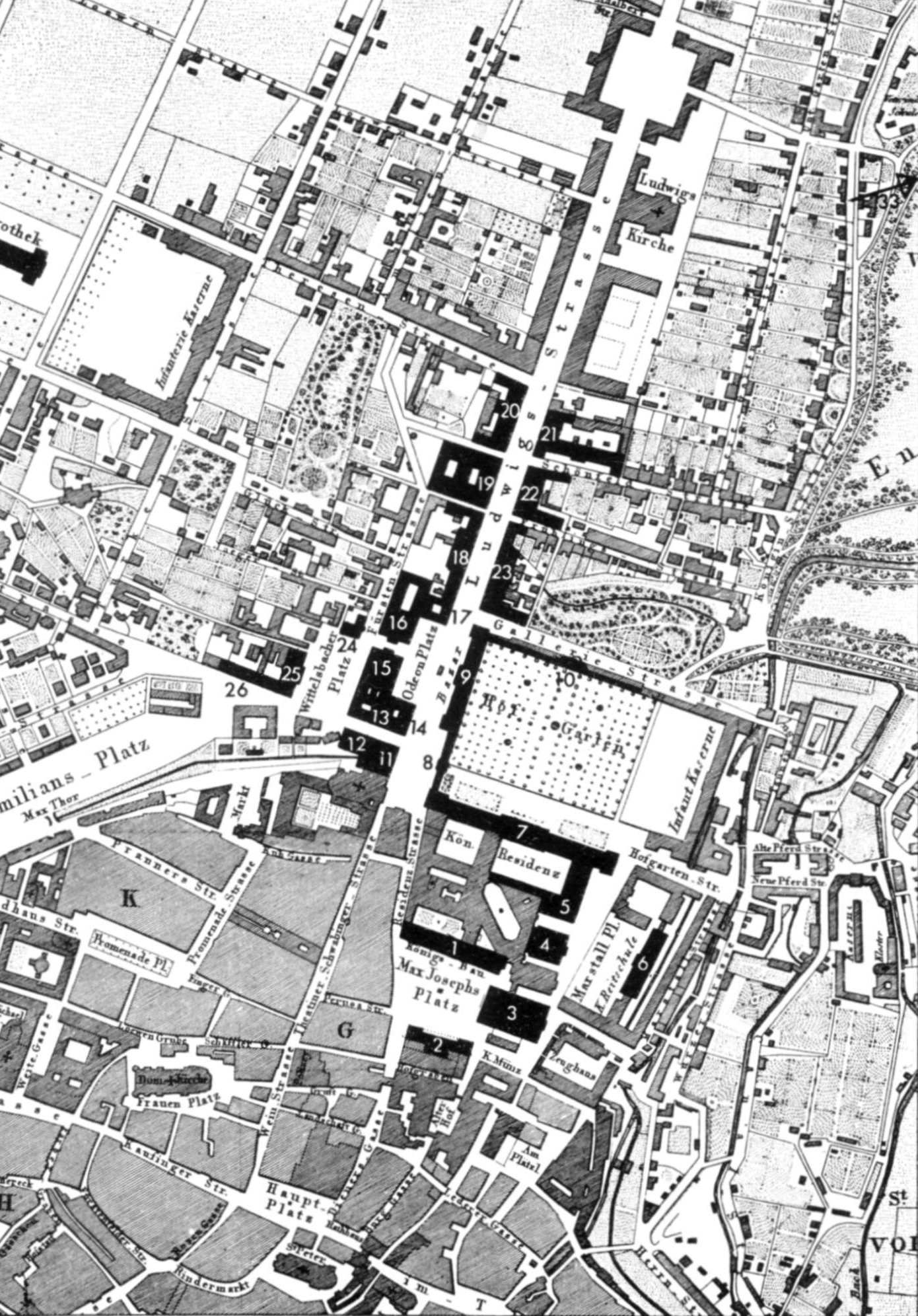 Ausschnitt aus einem Stadt Münchens aus dem 19. Jh.